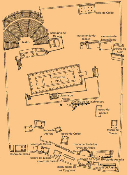 Recreación simplificada del plano del santuario de Delfos en Grecia.